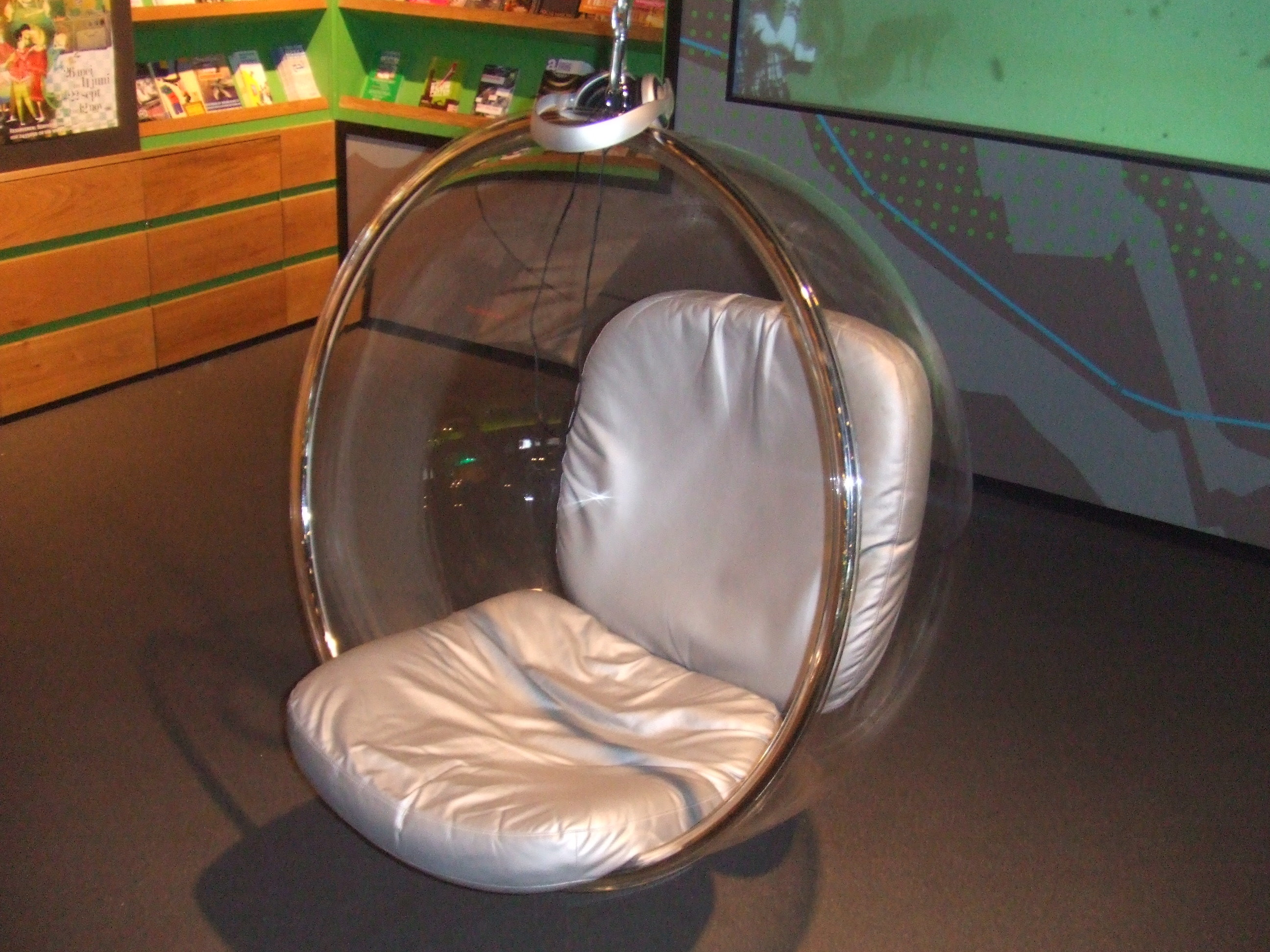 Eero Aarnio: Bubble Chair, 1968, gefotografeerd in de Centrale Bibliotheek Rotterdam